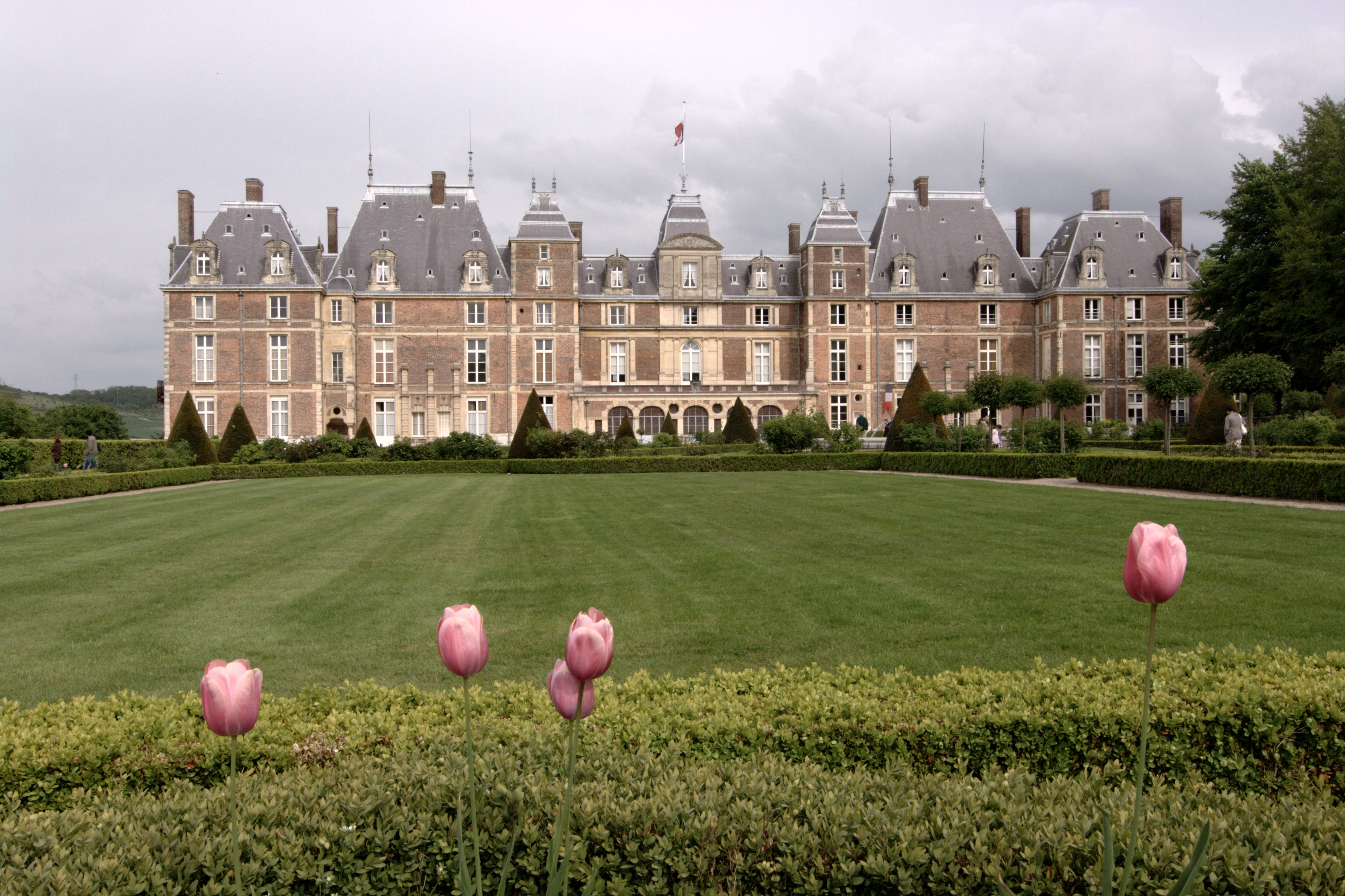 Le chateau d'Eu hébergeant également la mairie.